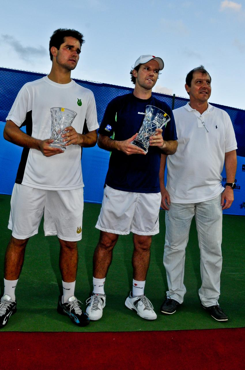 Campeão e vice-campeão do Aberto de Tênis da Bahia de 2010 segurando os seus troféus.